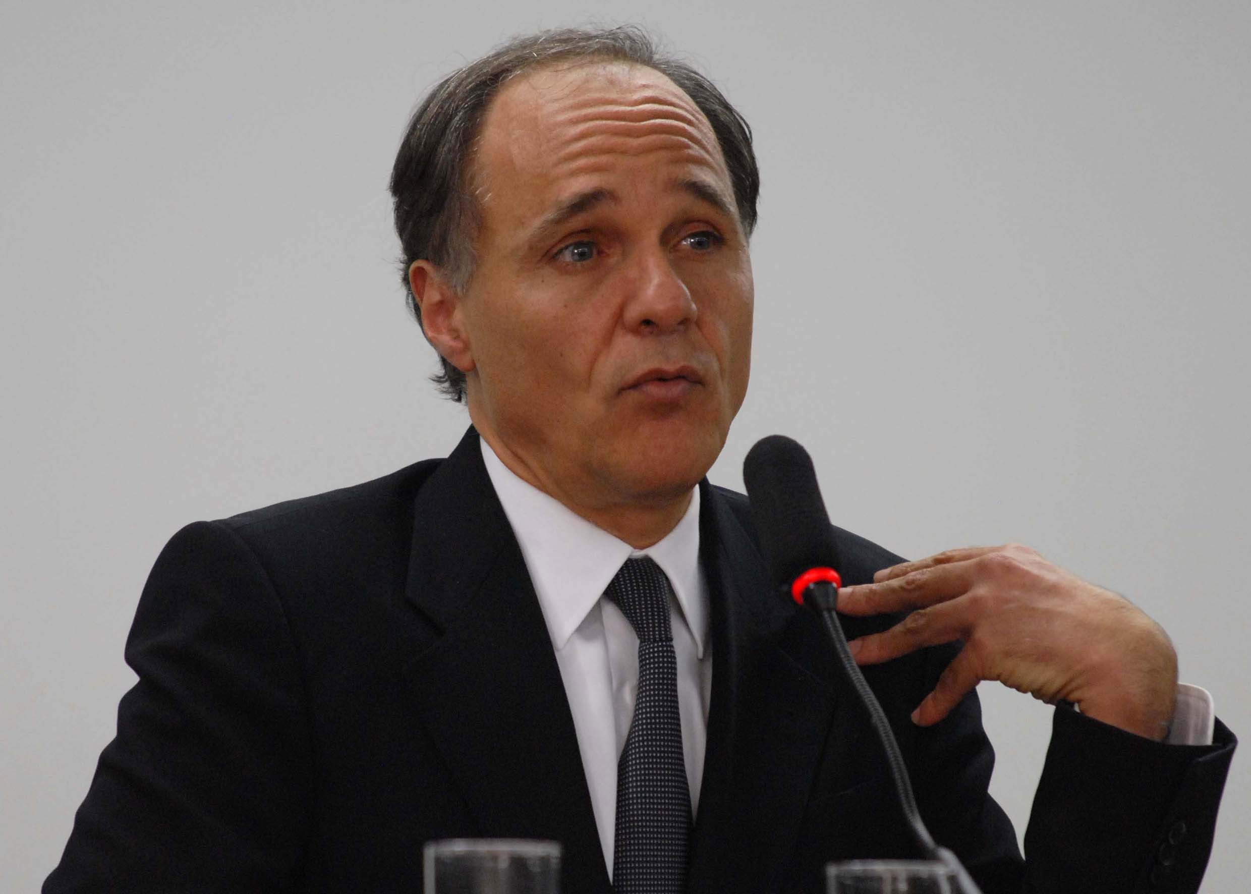 O banqueiro brasileiro Daniel Dantas